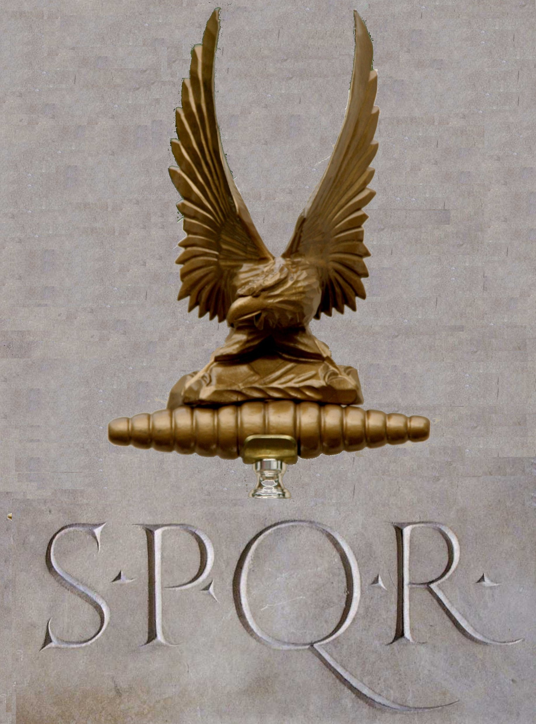 Aquila dei vessilli dell'antica Roma Elaborazione dei file :Image:Roman aquila.jpg Composizione delle immagini Image:Roman aquila.jpg (GFDL-self) + Image:Spqrstone.jpg (GFDL)